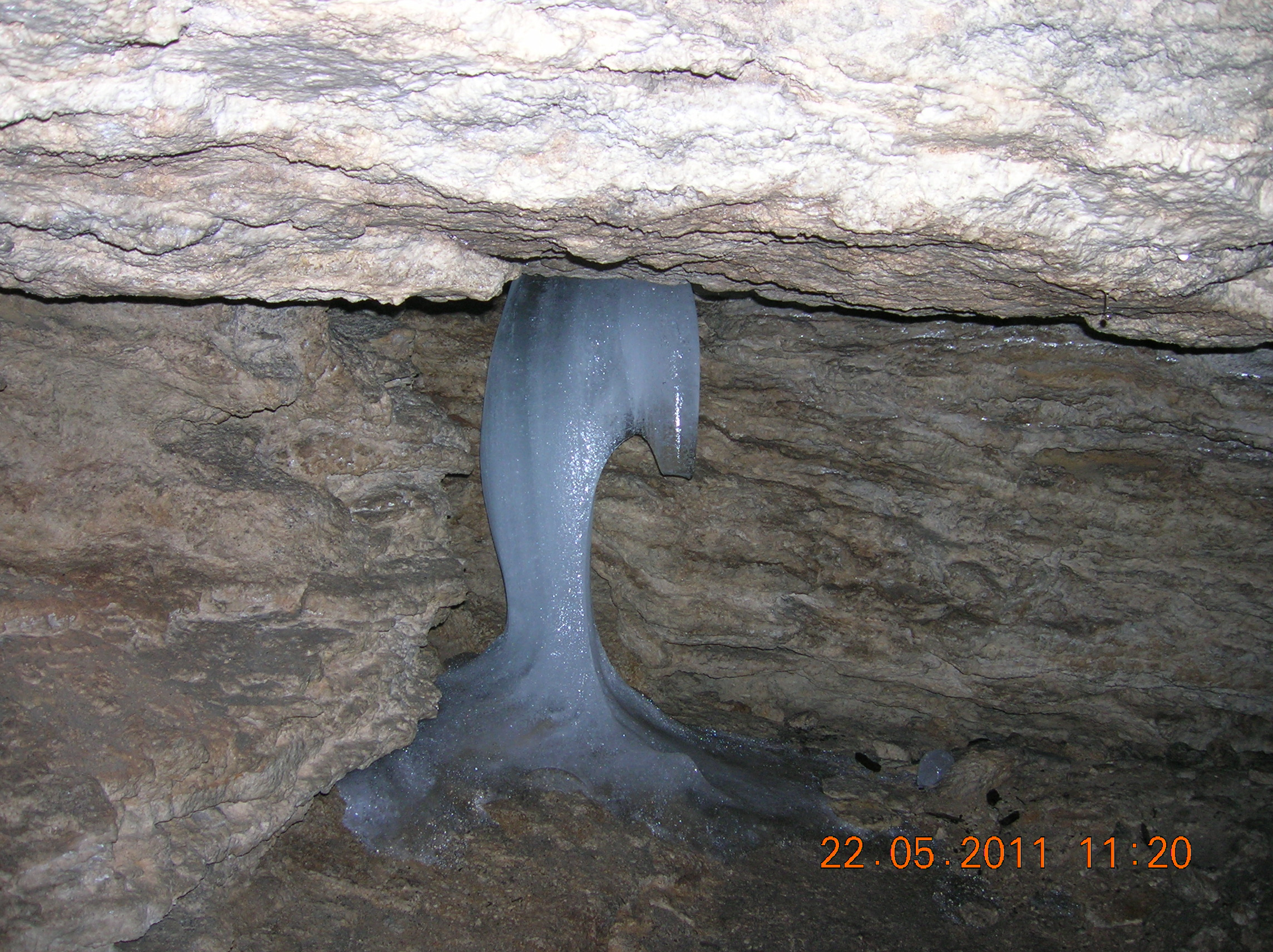 Jud. Harghita, Oraş Borsec, Rezervaţia Scaunul Rotund, Peştera de gheaţă